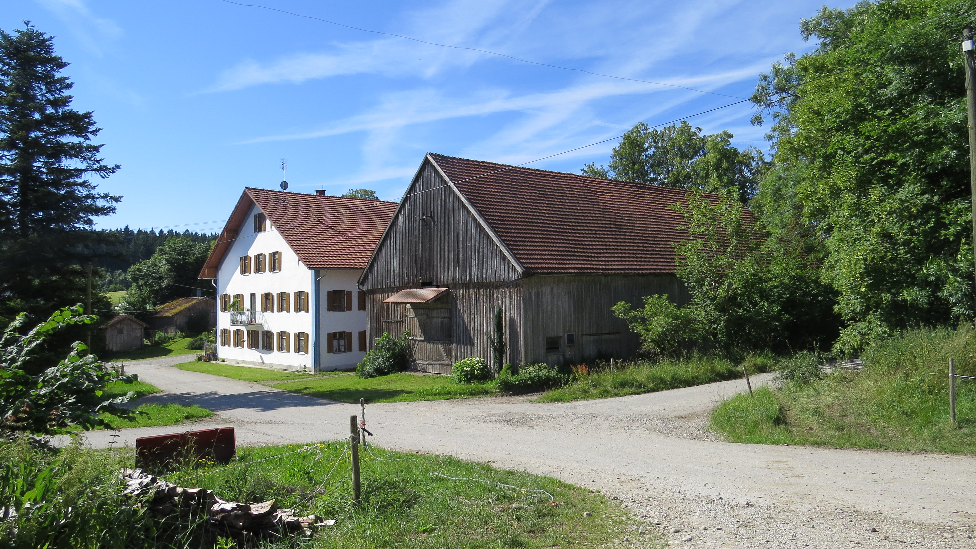 Schäfmoos 2 mit historischem Stadel, Fuchstal